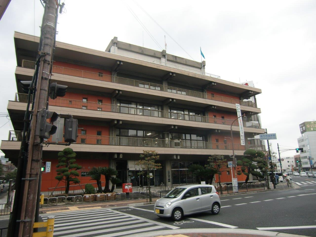 枚方市役所を東側より撮影